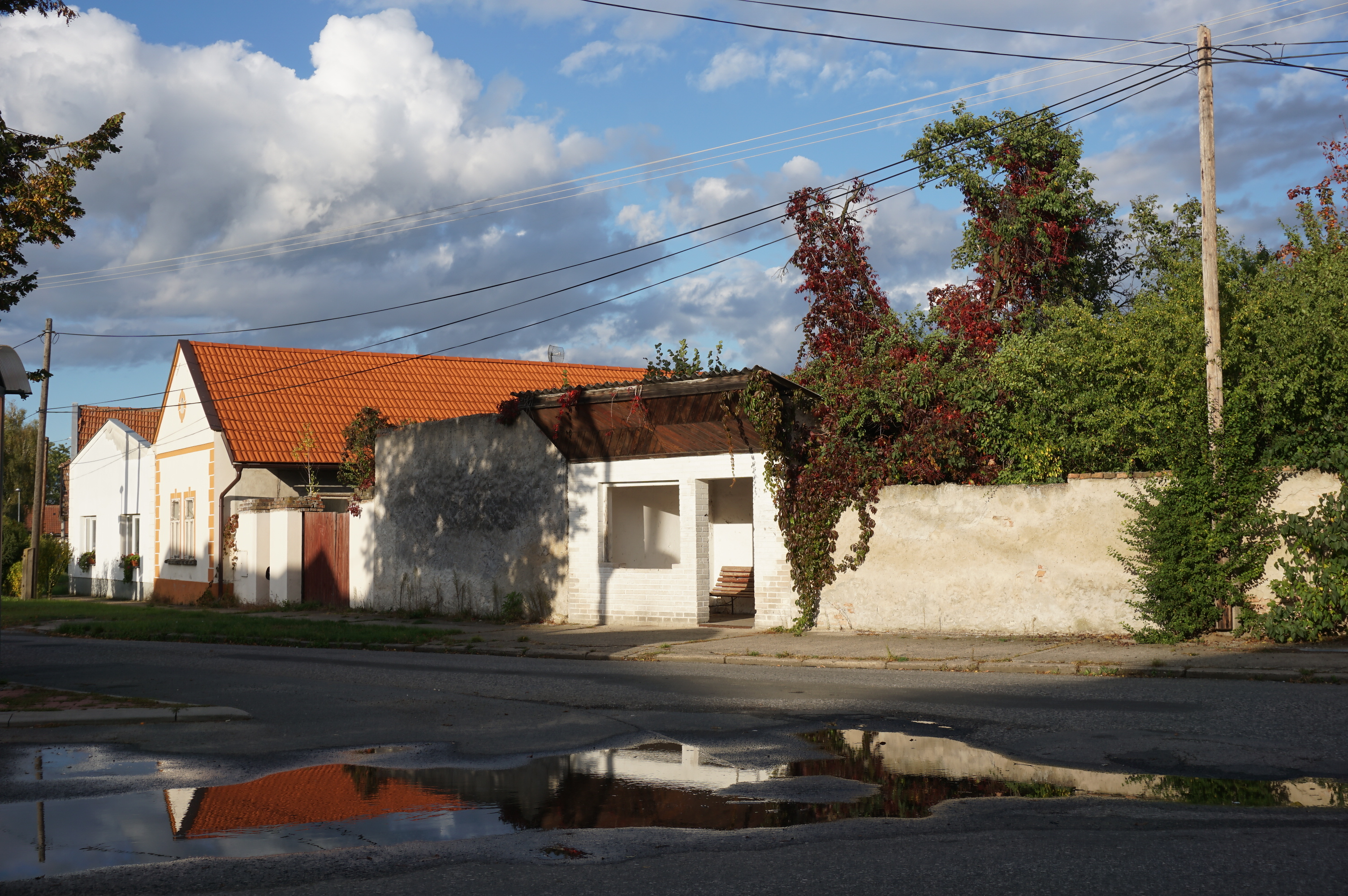 Záryby - rozcestí u autobusové zastávky